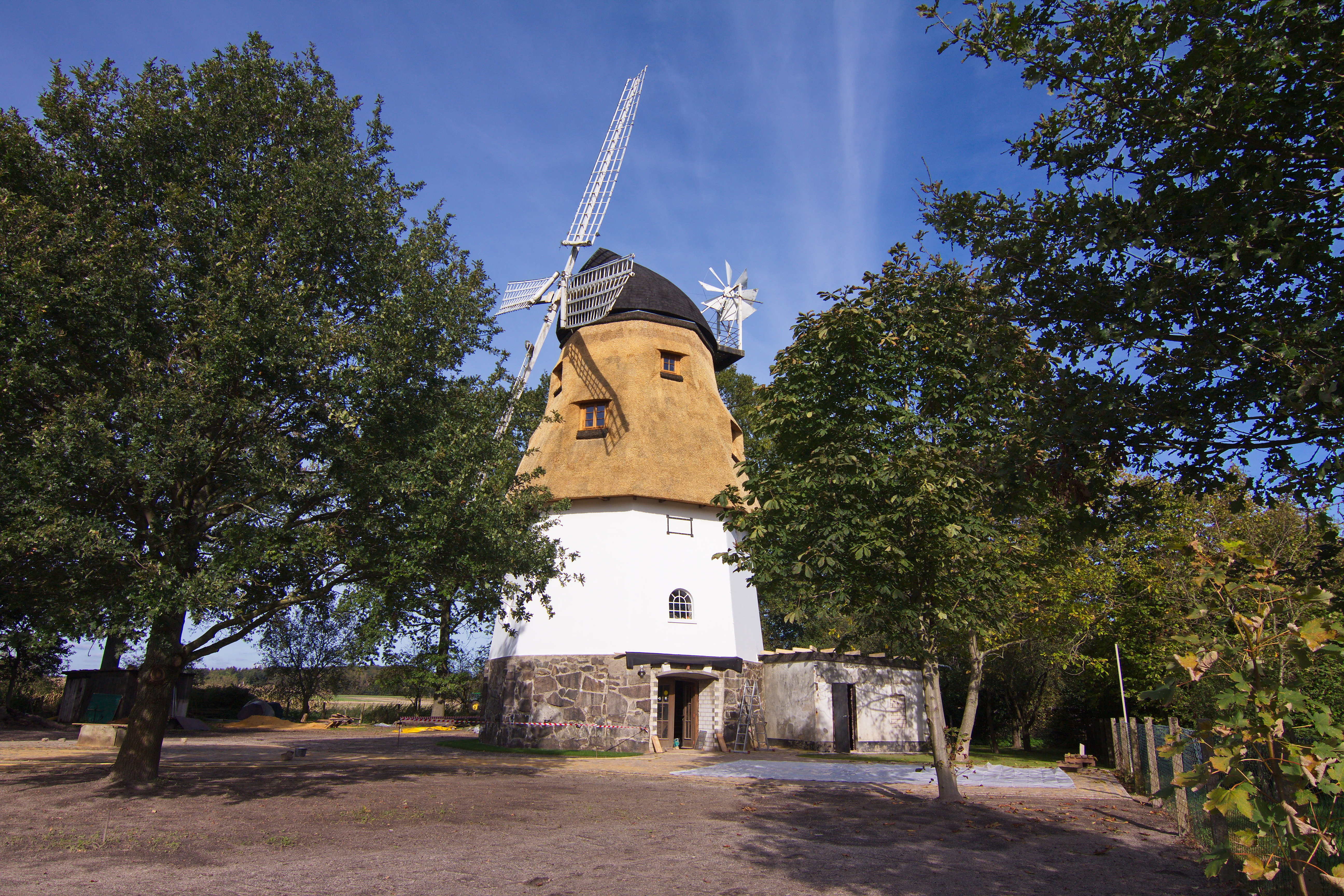 Windmühle in Heber (Schneverdingen), Niedersachsen, Deutschland